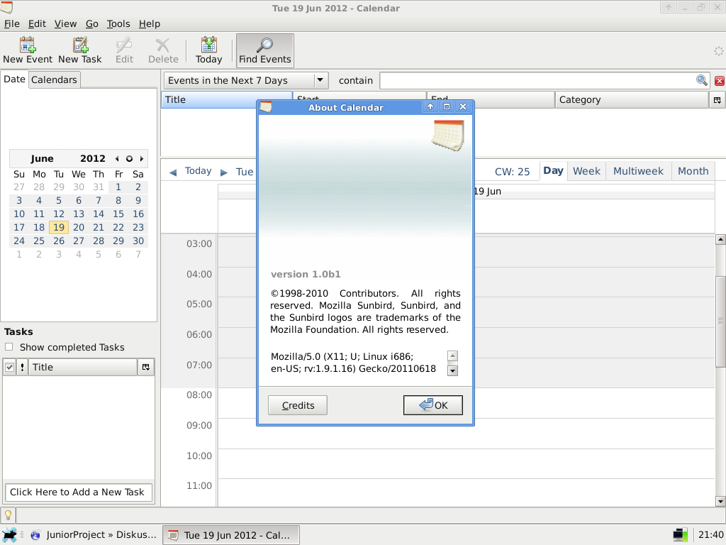 Kalendář IceOwl